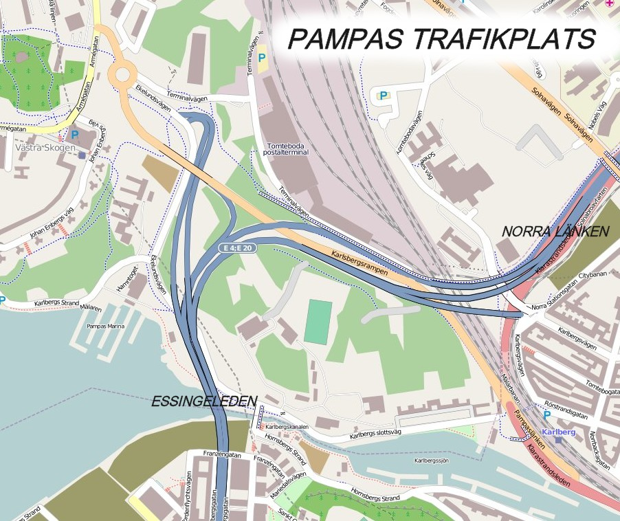 Pampas trafikplats i Stockholm/Solna